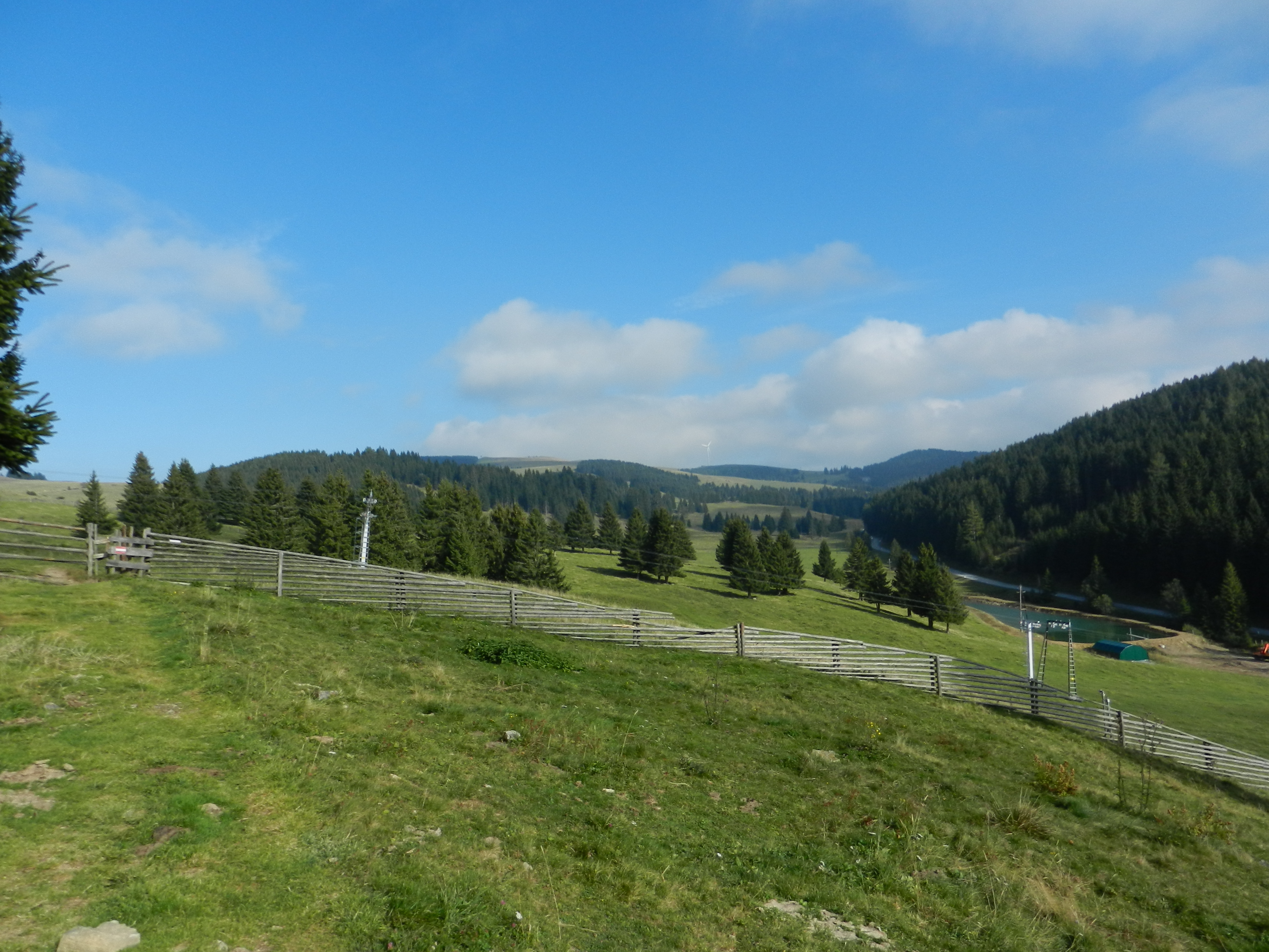 Sommeralm Landschaft